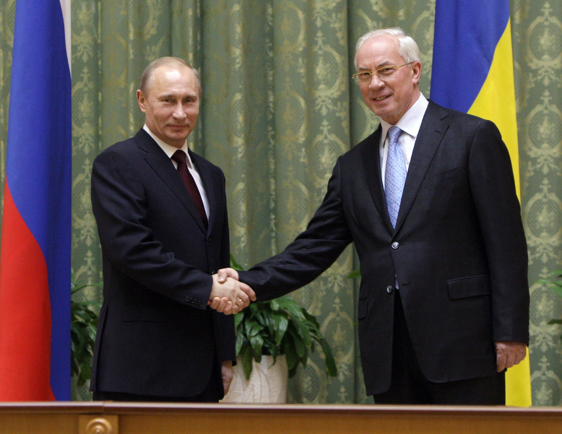 Председатель Правительства Российской Федерации В.В.Путин провёл в Киеве переговоры с Премьер-министром Украины Н.Я.Азаровым